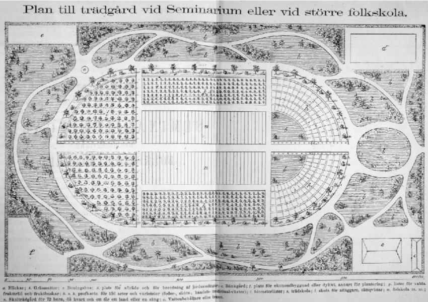 Seminarschulgarten, Idealentwurf von Olof Eneroth